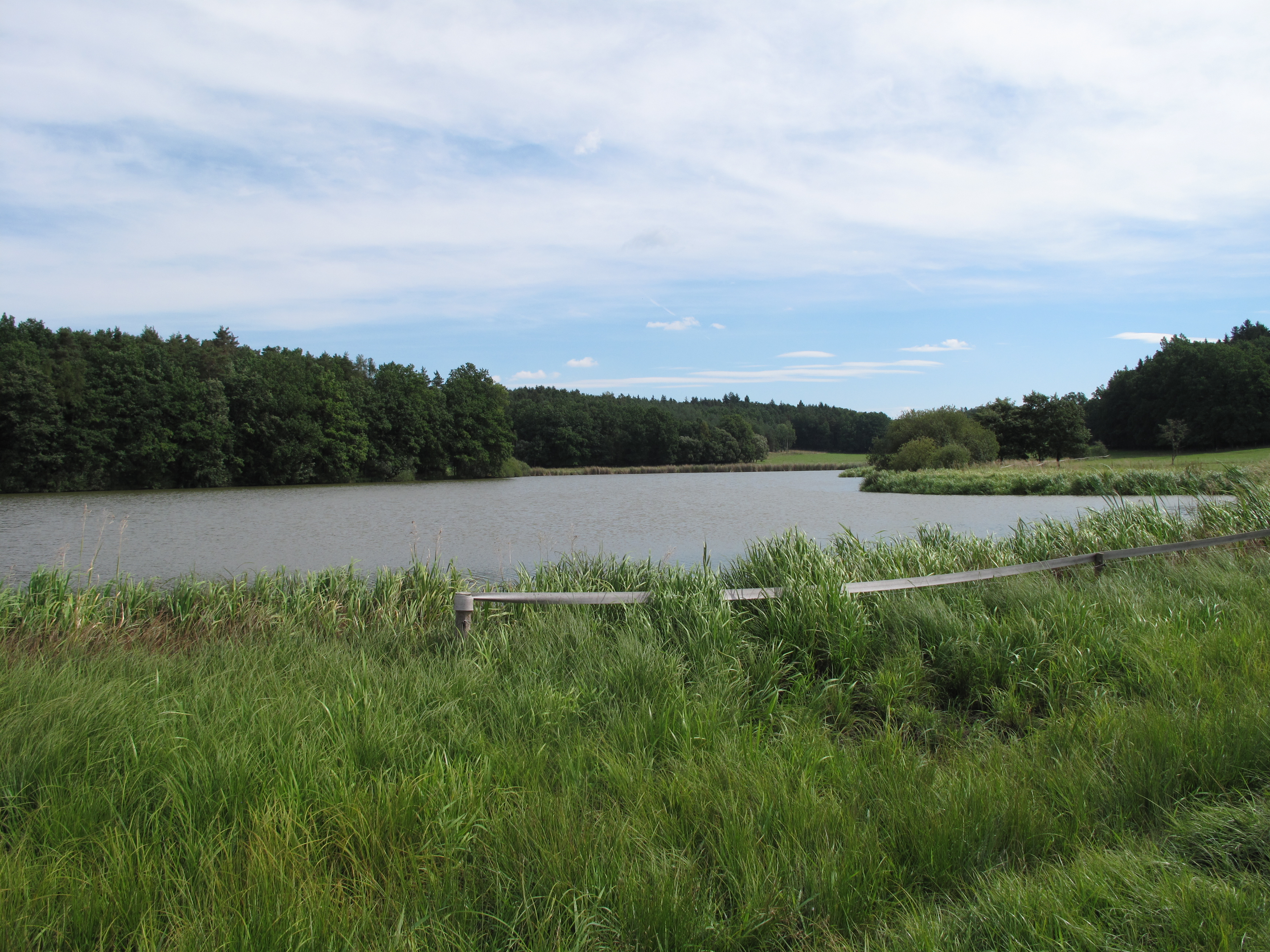 Rybník Kočkov. Okres Písek, Česká republika.